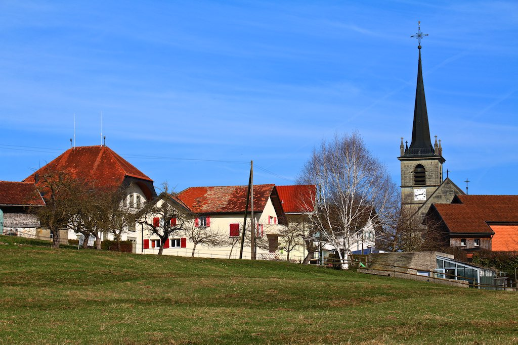 Rando de 18,5 Km sur le chemin de Saint-Jacques de Compostelle (Via Jacobi) de Neyruz à Villaz Saint-Pierre, dans la Glâne fribourgeoise